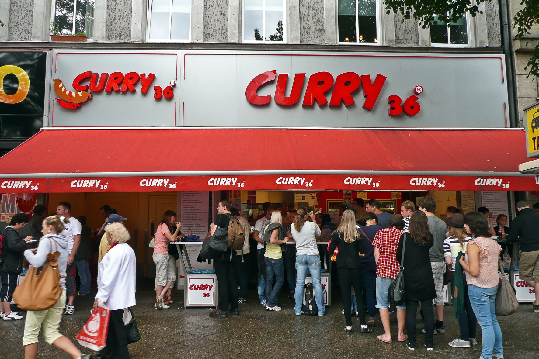 Berlin, Germany, Mehringdamm 36, Imbiss "Curry 36"